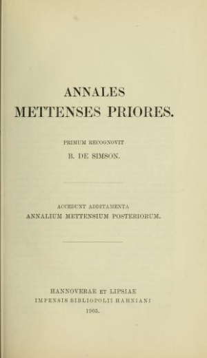 Frontespizio degli Annales Mettenses priores